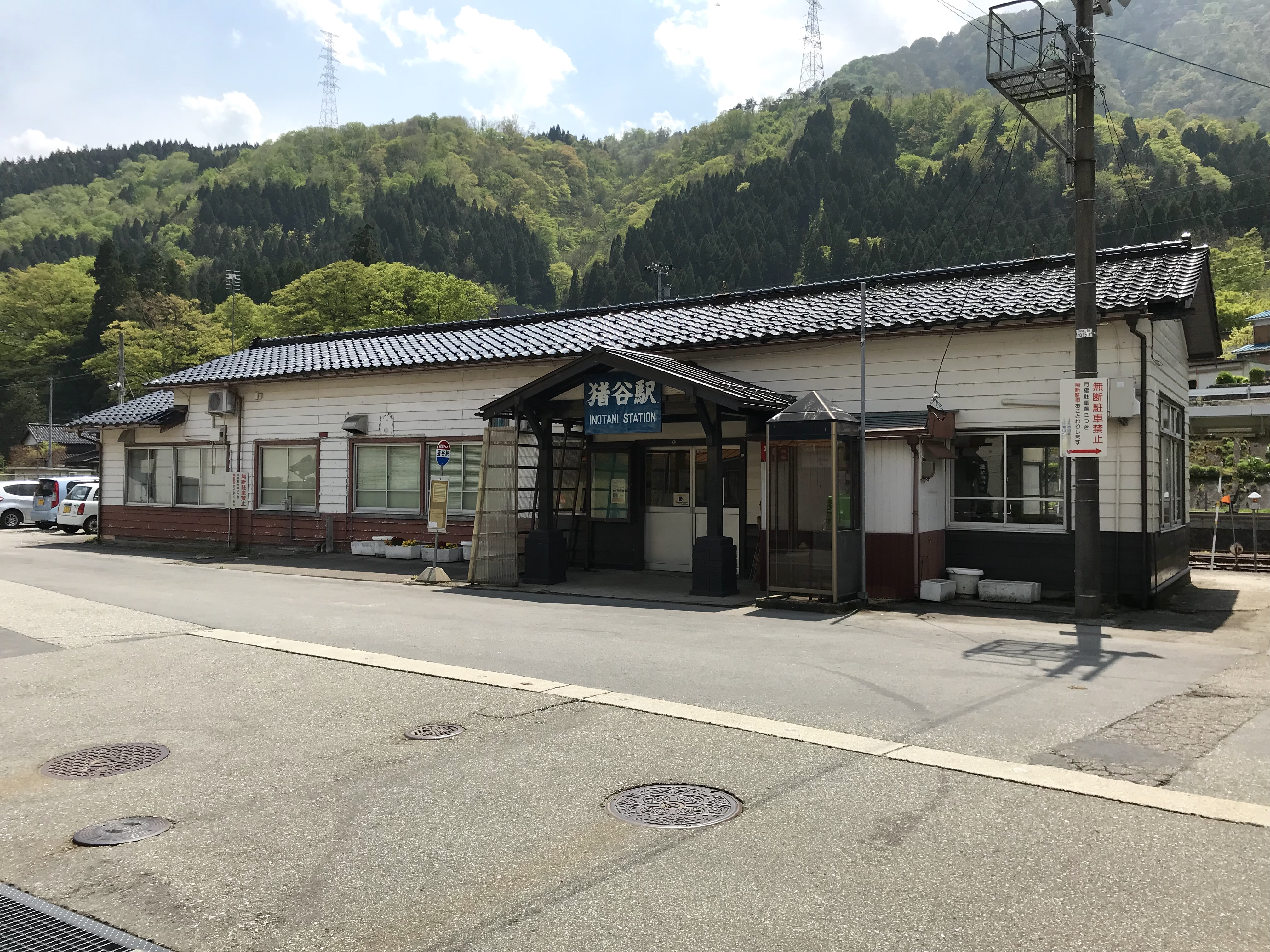 JR西日本・JR東海高山本線猪谷駅駅舎